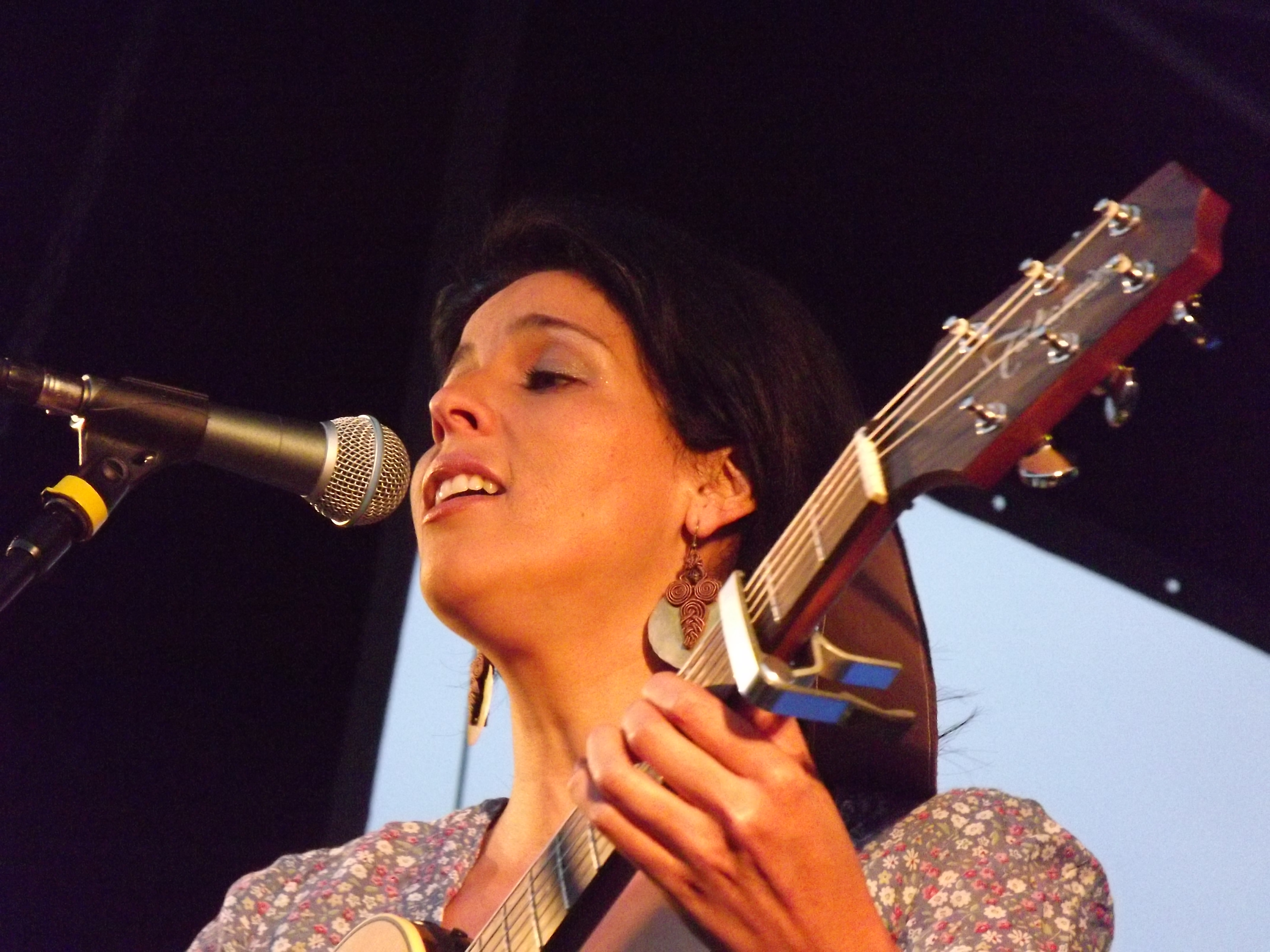 Souad Massi en concert en 2011